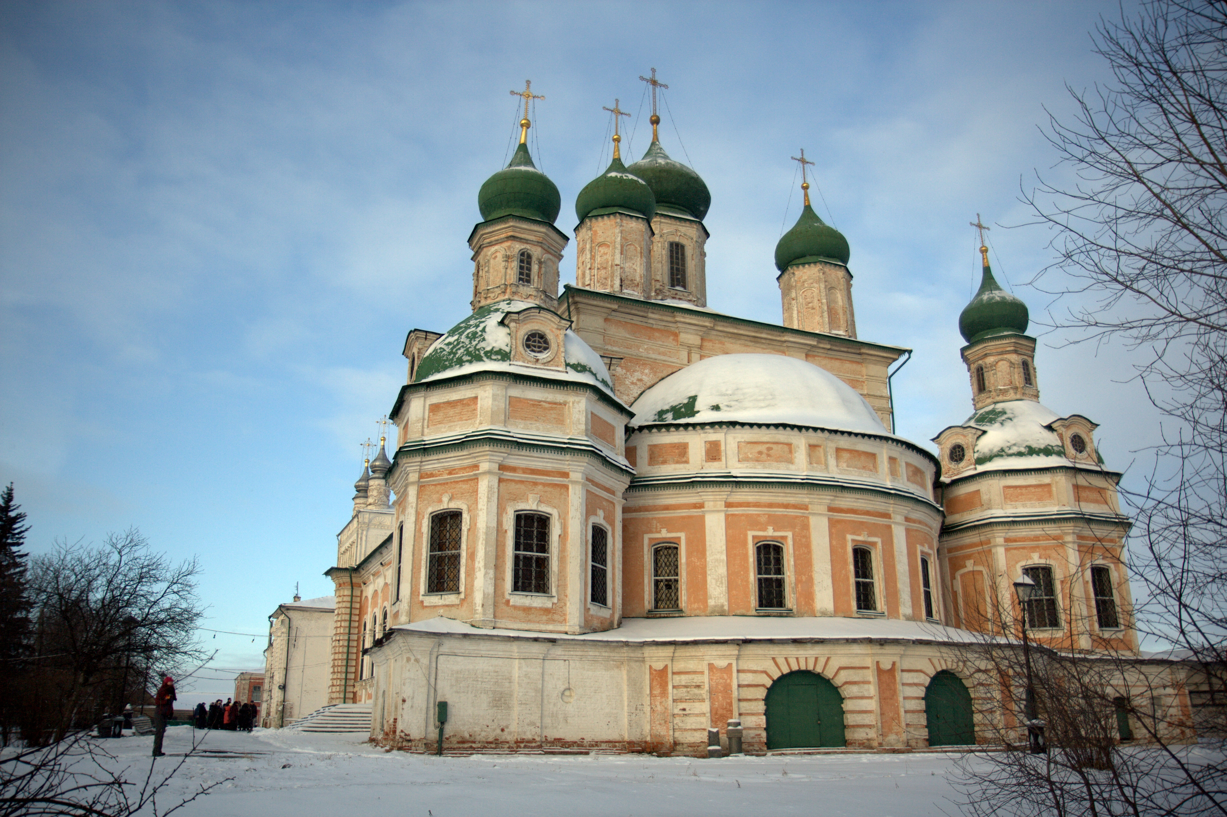 Успенский собор (Переславль-Залесский)